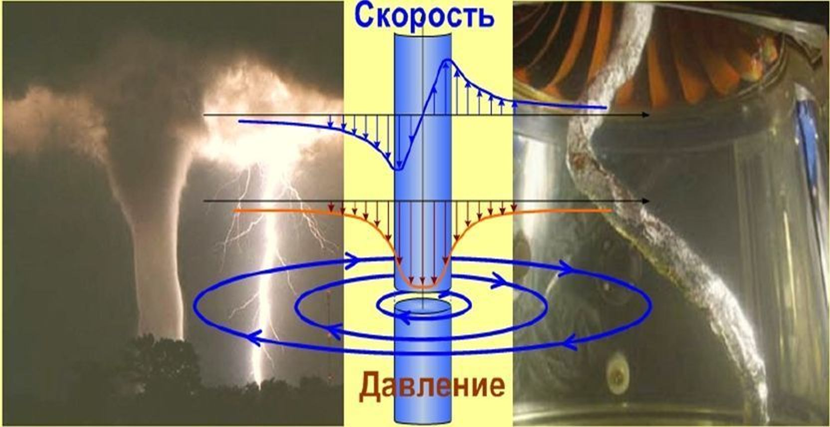 Смерч и кавитационный шнур за радиально-осевой турбиной и распределения скорости и давления в поперечных сечениях этих вихревых образований.